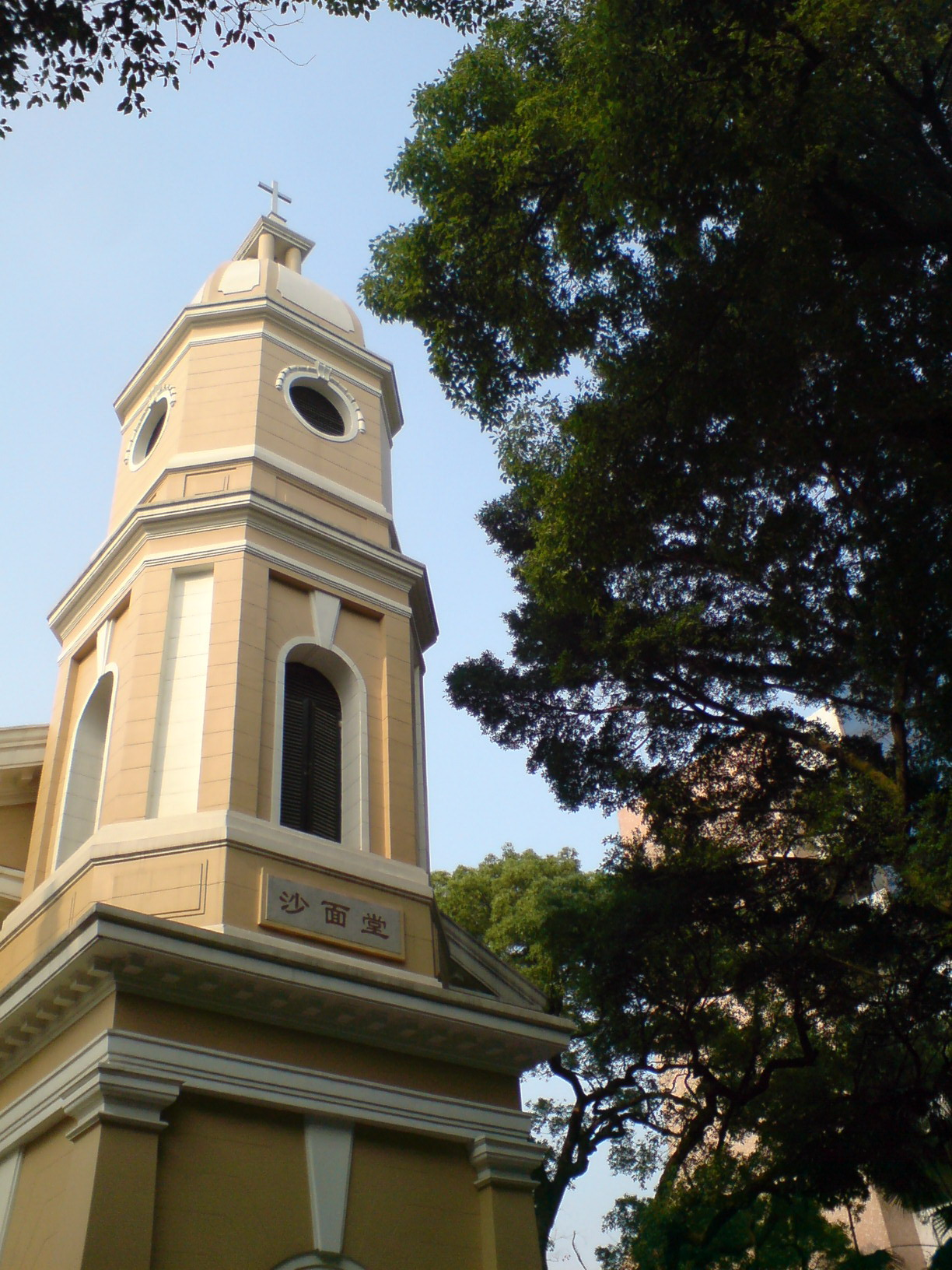 中文（中国大陆）: 广州基督教沙面堂